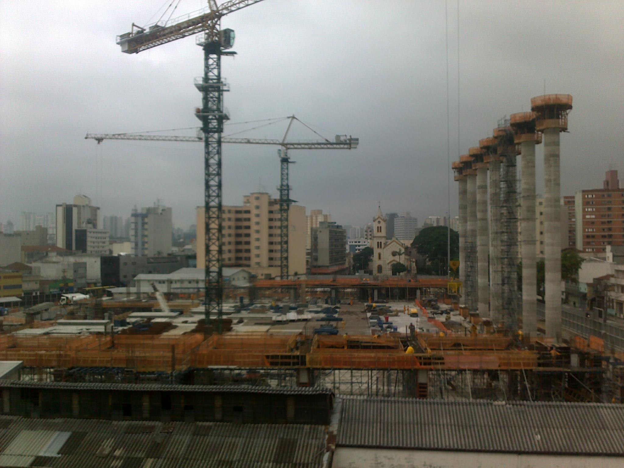 Local de construção do Templo de Salomão